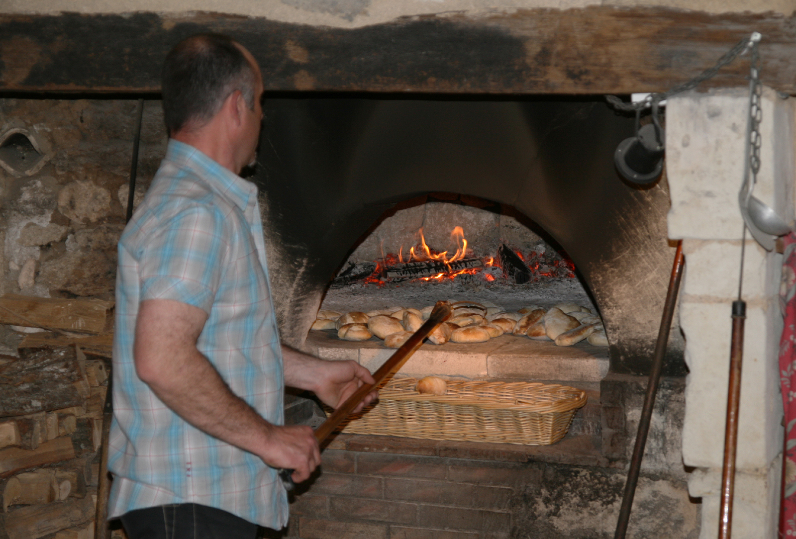 Four pain